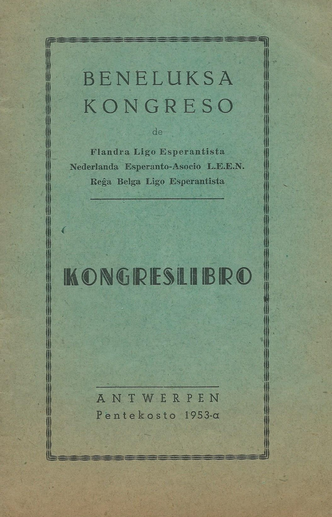 kovrilo de "Beneluksa Kongreso : kongreslibro", 1953